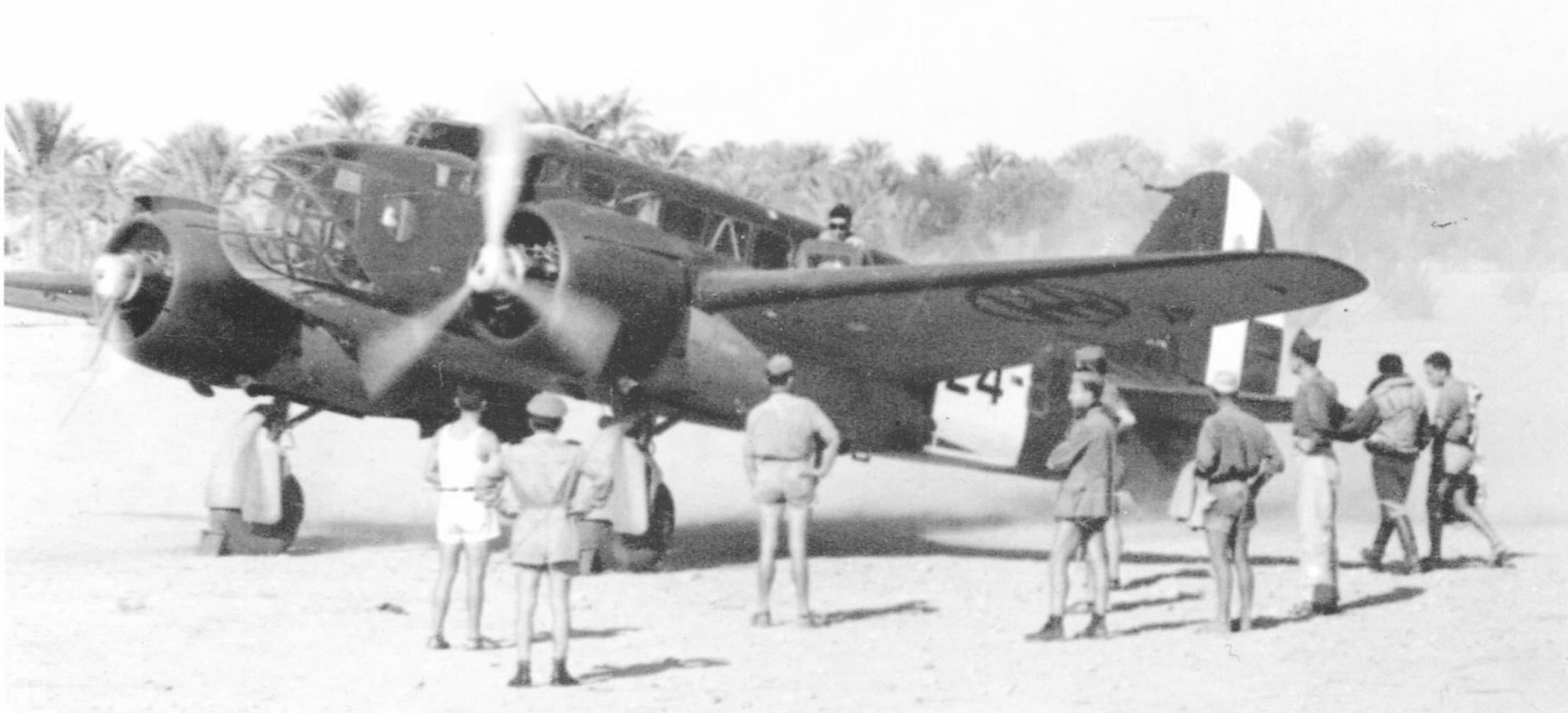 Caproni Ca 312bis